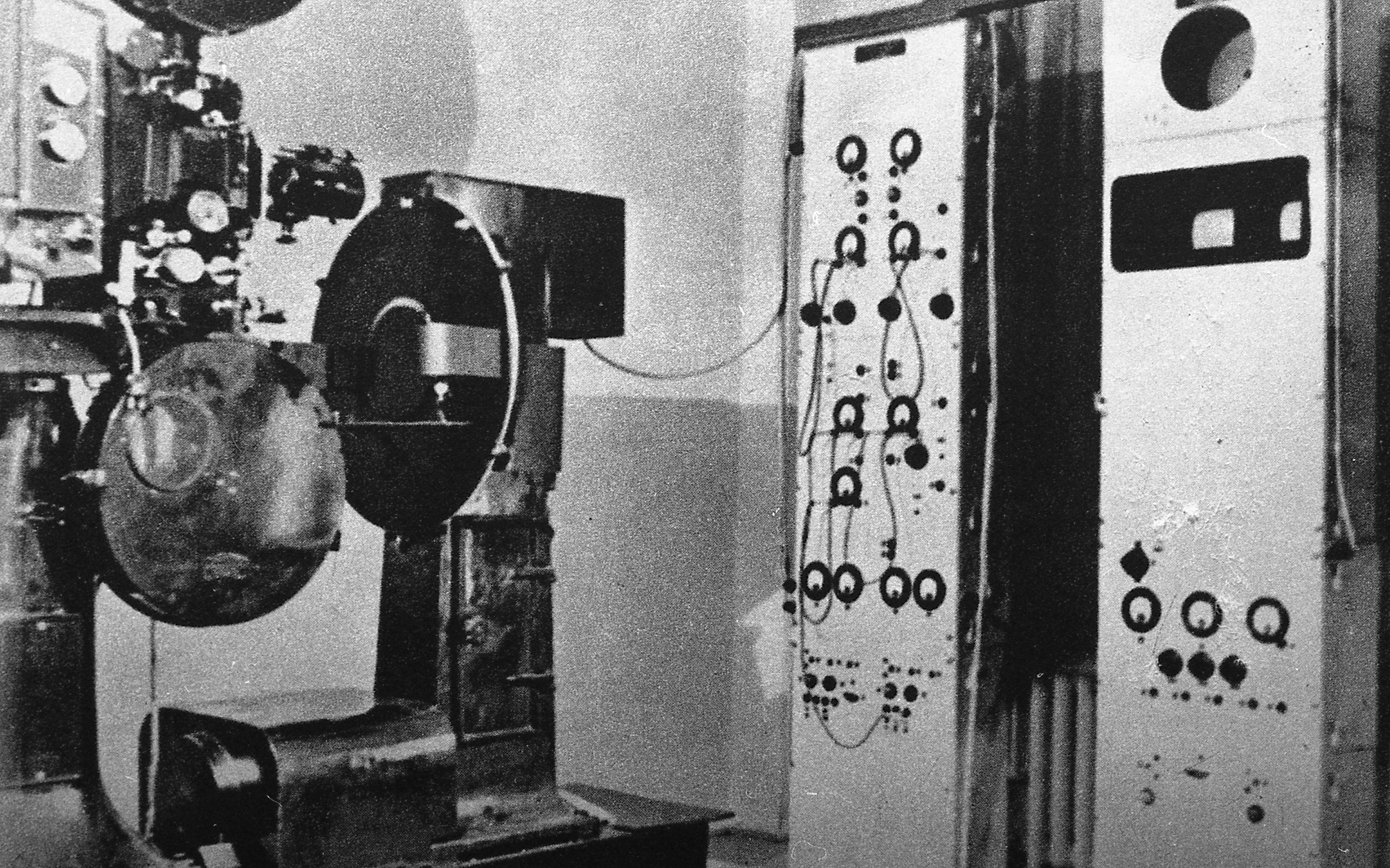 Została wykonana w Państwowym Instytucie Telekomunikacyjnym. Z lewej strony widoczny jest projektor filmowy z obiektywem (1939 r.)